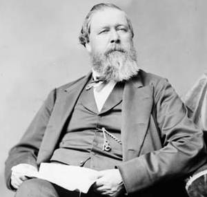 Hon. John Ferguson, Senator